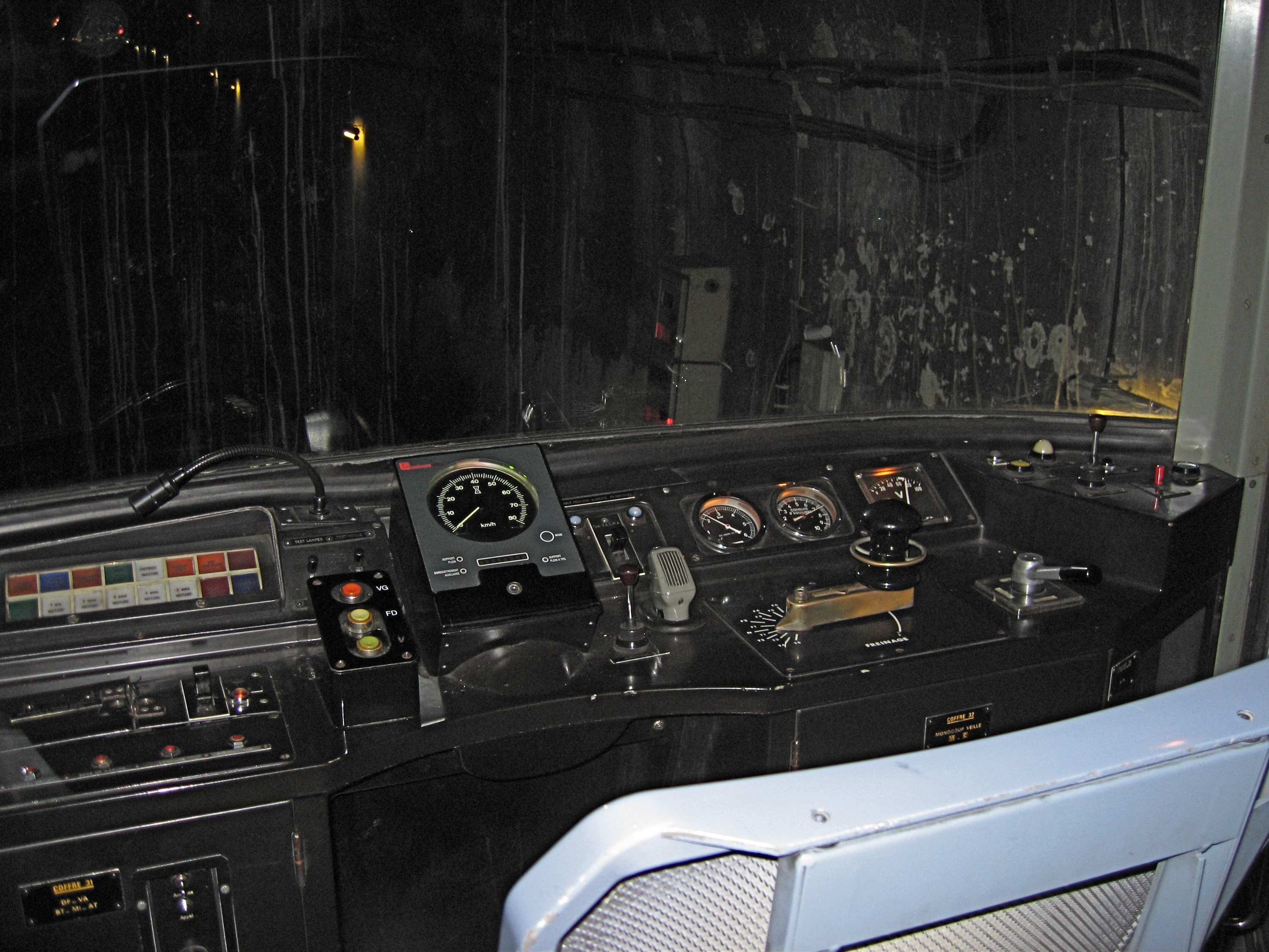 Journées du patrimoine RATP 16-17/09/2006. Cabine de conduite d'un MF 67.